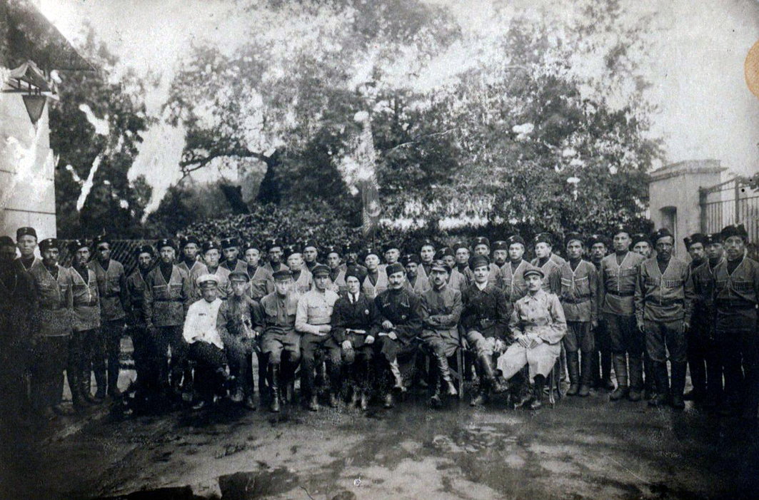 Molla Nur Vahidov 1 Ağustos 1918'de Merkez Müslüman Askeri Heyeti üyeleri arasında. Vahidov en ön sıra ortada oturan